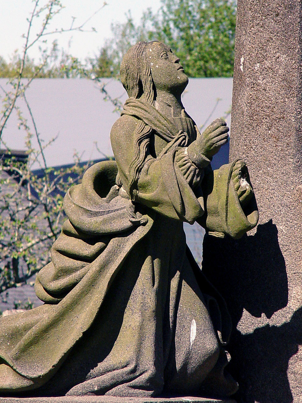 Pencran (Bretagne, Finistère) Calvaire: Maria Magdalena zu Füßen des Kreuzes.